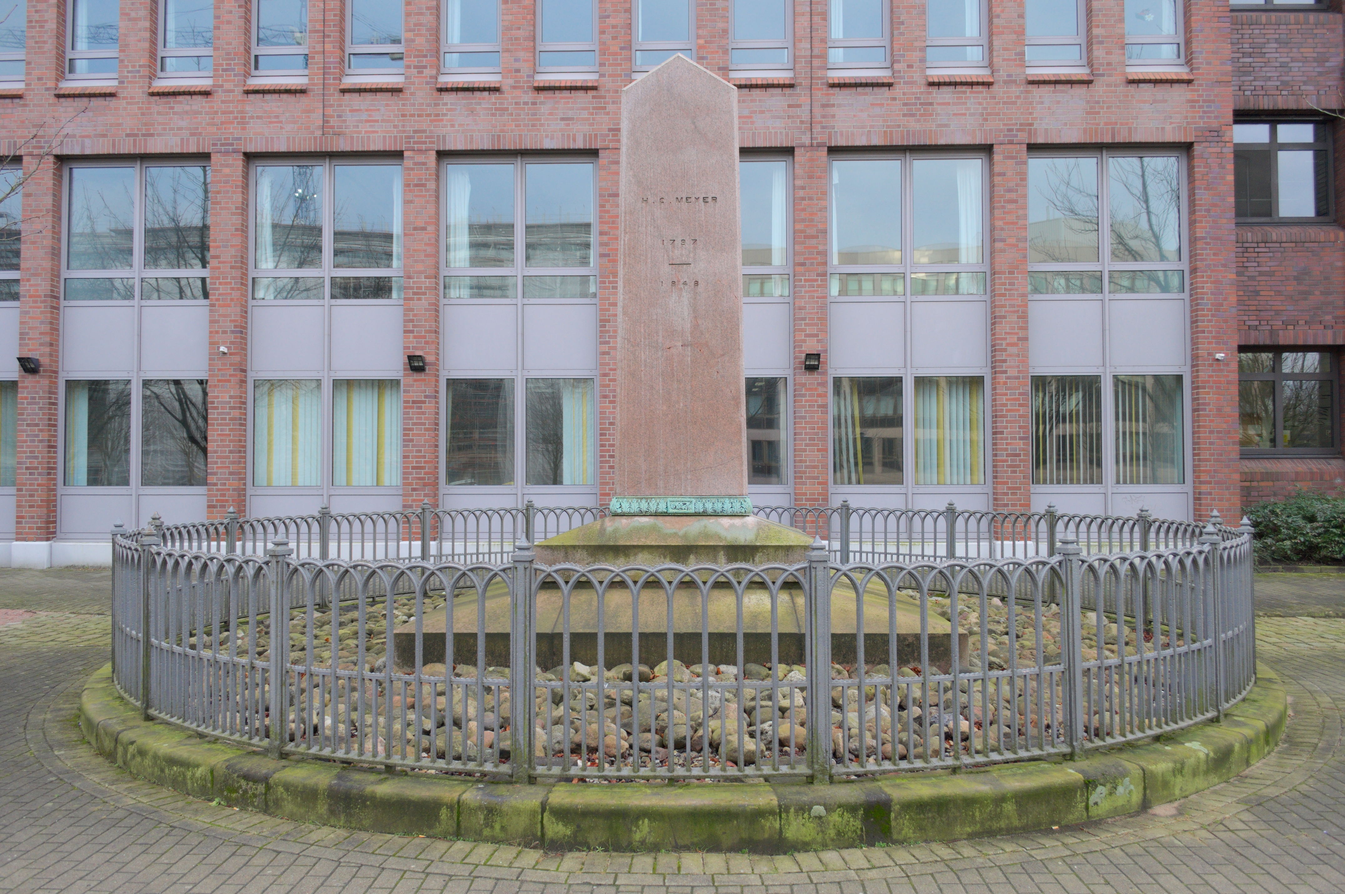 Denkmal für Heinrich Christian Meyer am Südüfer des Mittelkanals zwischen Nagelsweg und Hammerbrookstraße in Hamburg-Hammerbrook. Das Denkmal wurde 1854 am Klostertor enthüllt, wechselte mehrmals den Standort und wurde 1985 an die heutige Stelle versetzt.